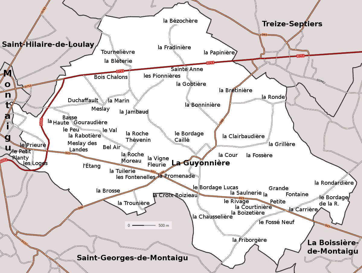 Carte des lieux-dits de la commune de la Guyonnière, Vendée, France